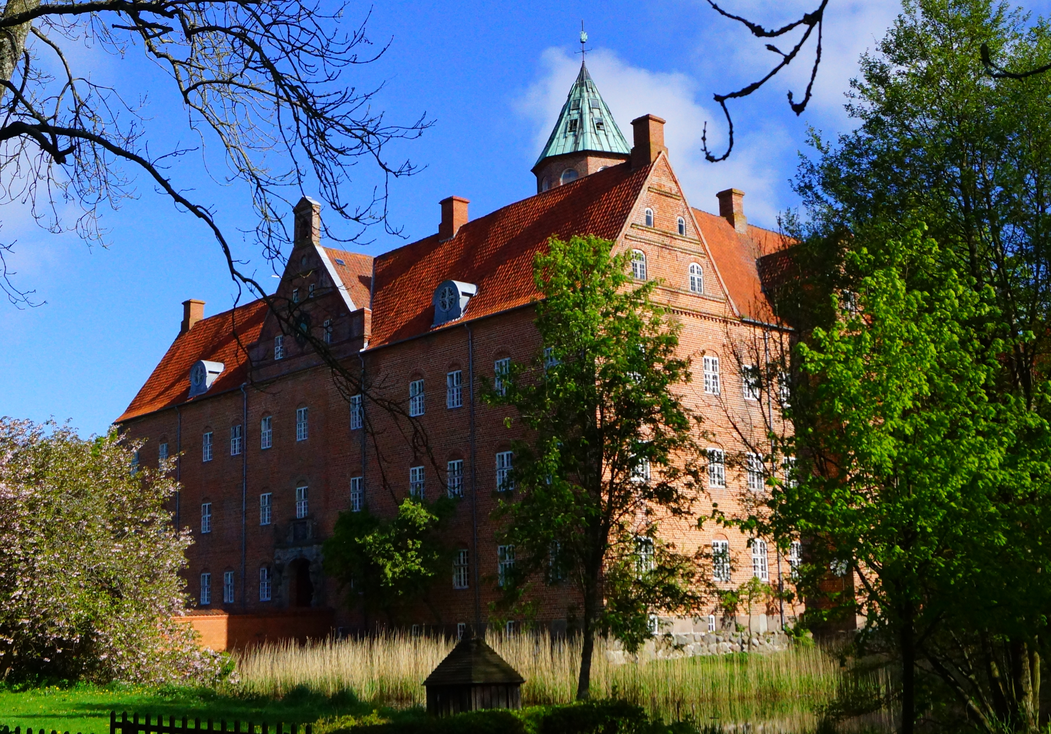 Sostrup Slot, fra syd